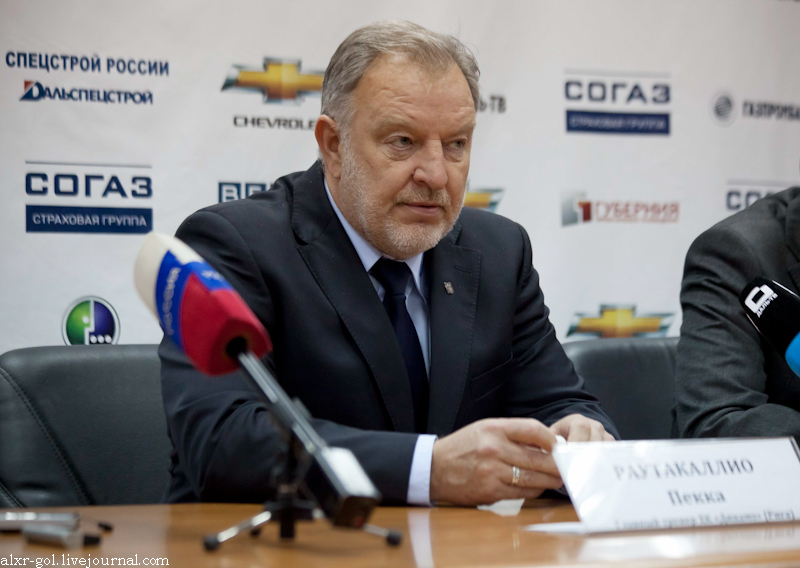 Пекка Раутакаллион на пресс-конференции после матча КХЛ «Амур» — «Динамо» (Рига) 27 ноября 2011 года